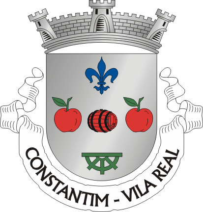 Brasão da freguesia de Constantim (concelho de Vila Real)